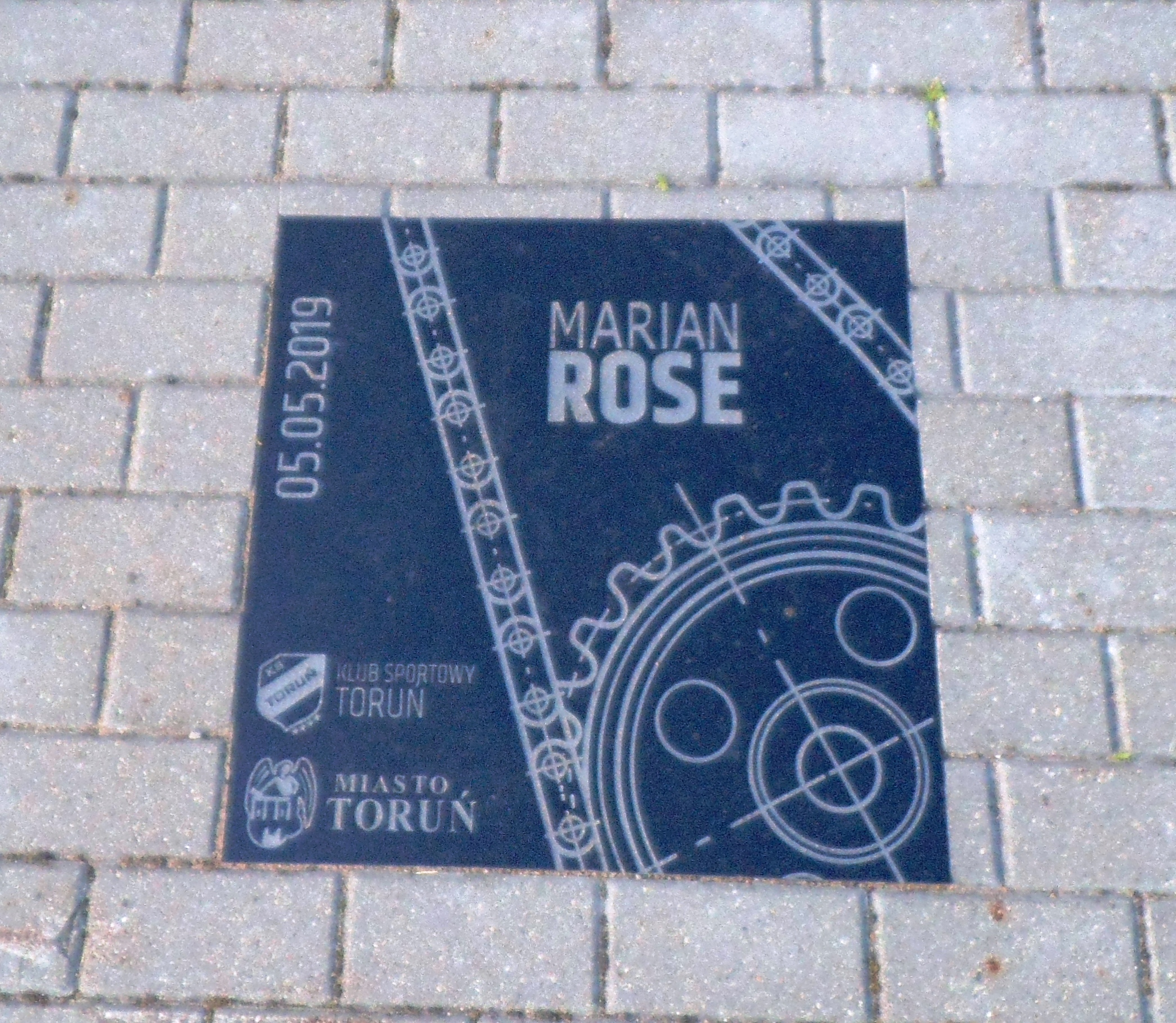 Toruńska Aleja Sportu Żużlowego1